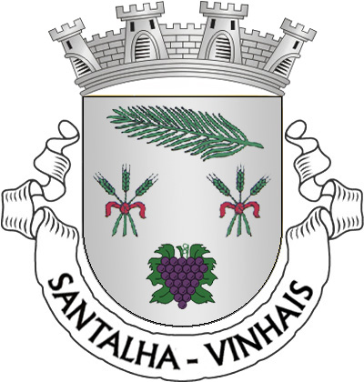 Brasão Freguesia de Santalha